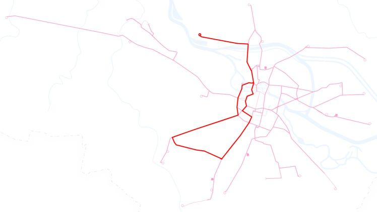 Poglądowa mapka przebiegu linii tramwajowej 24 we Wrocławiu.